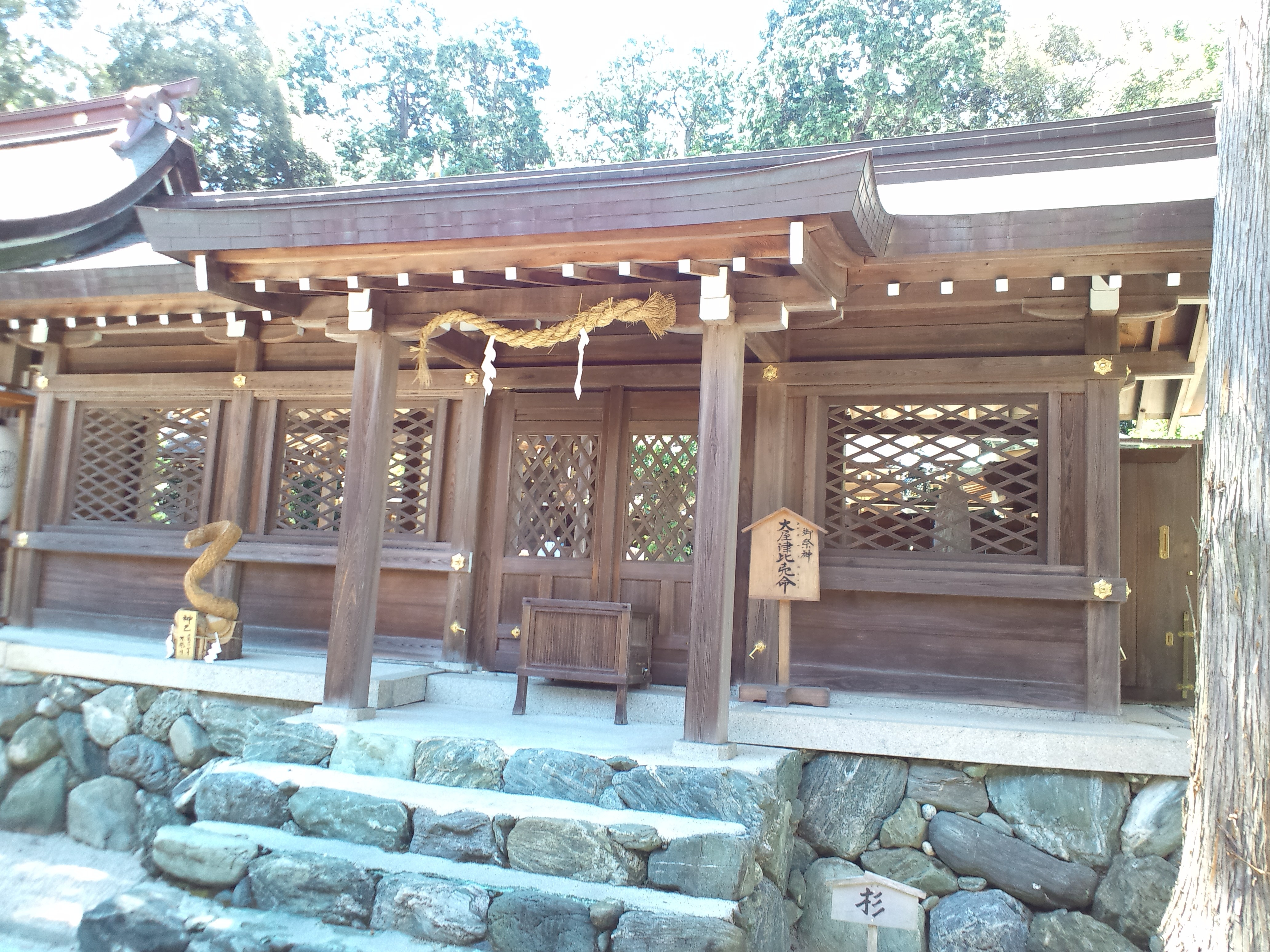 伊太祁曾神社 左脇宮 大屋津比賣命